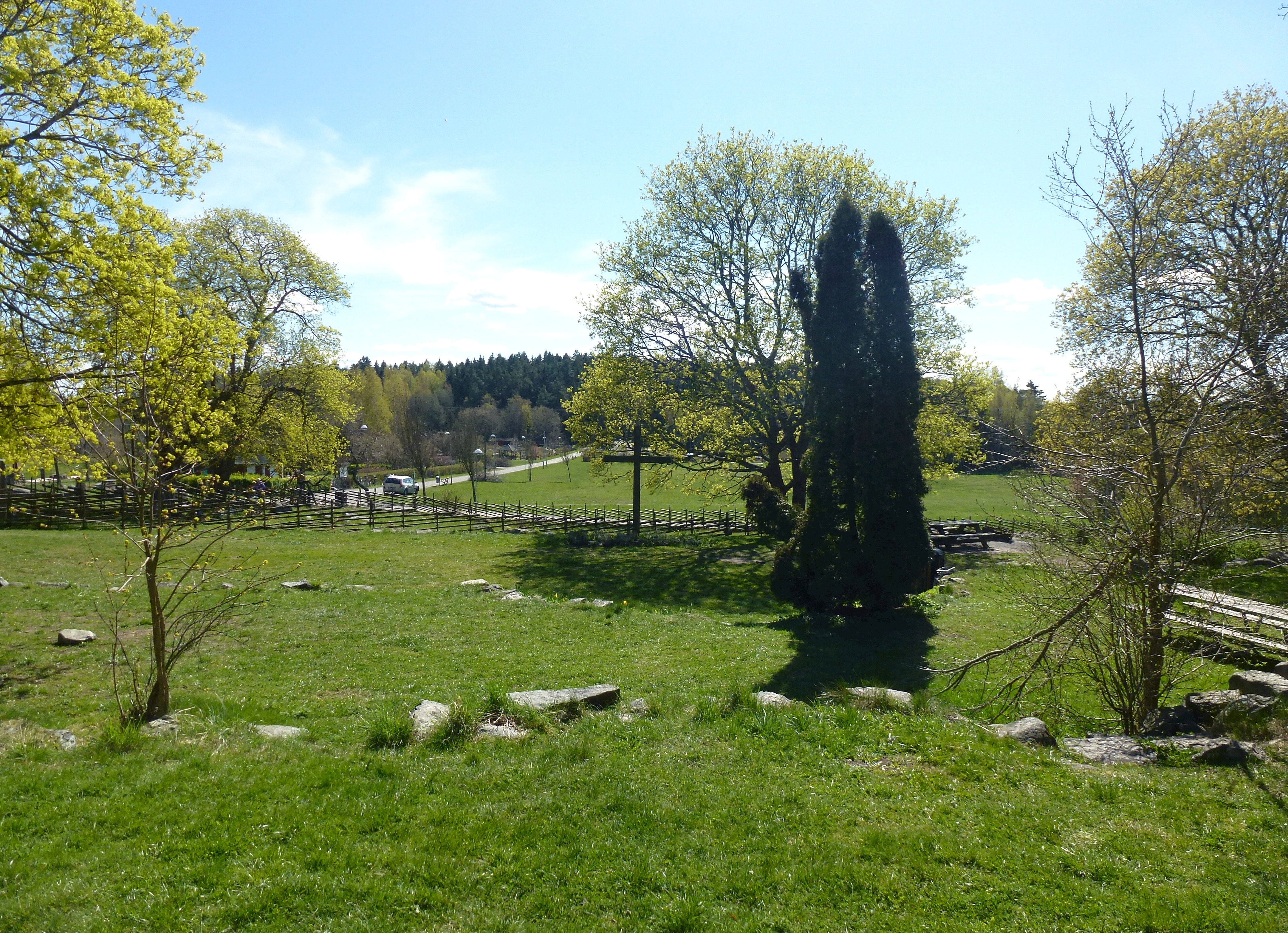 Akalla by ekonomibyggnader söder om Storgården